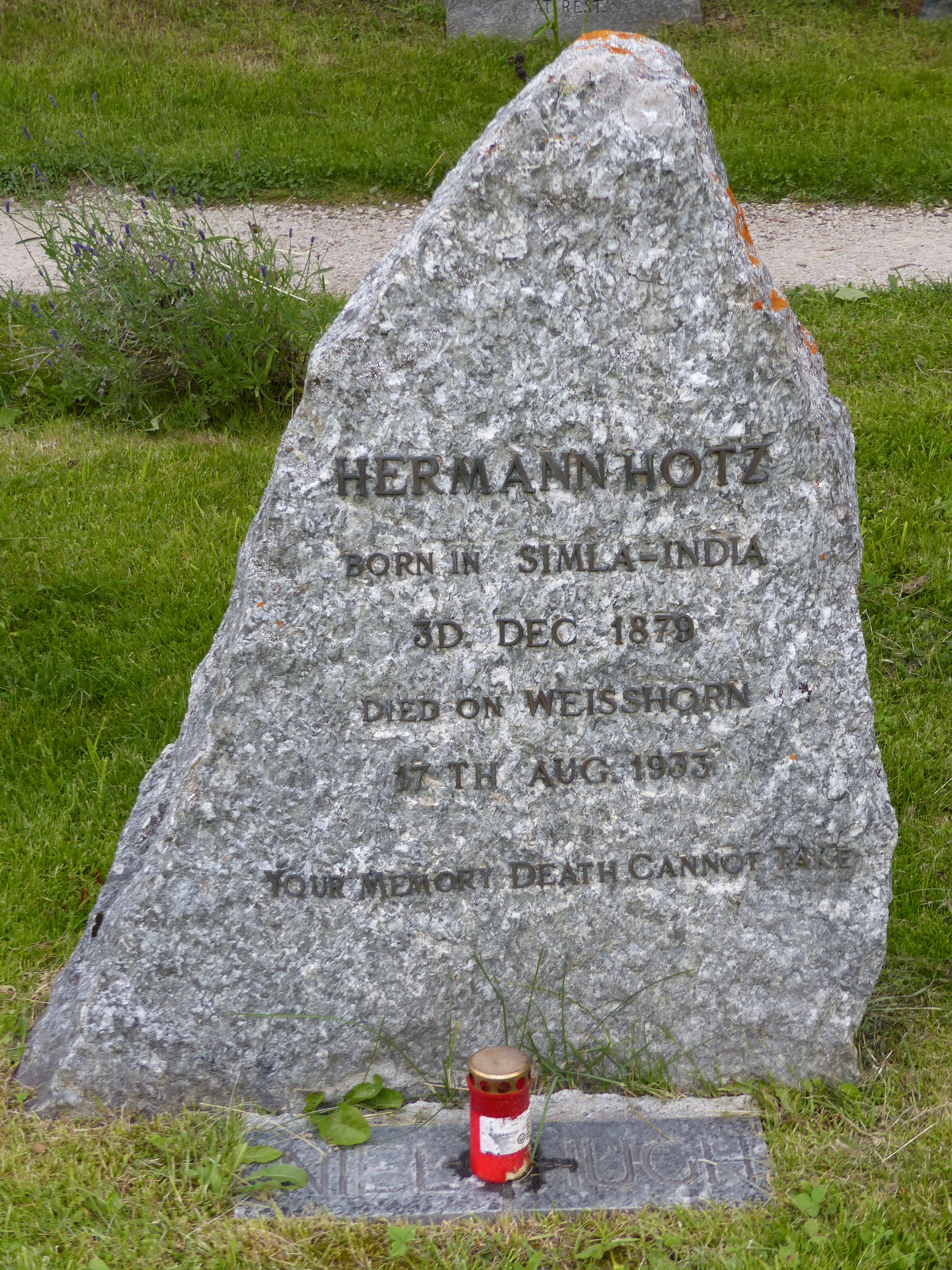 Bergsteigerfriedhof Zermatt: Grabstein von Hermann Hotz (1879-1933)